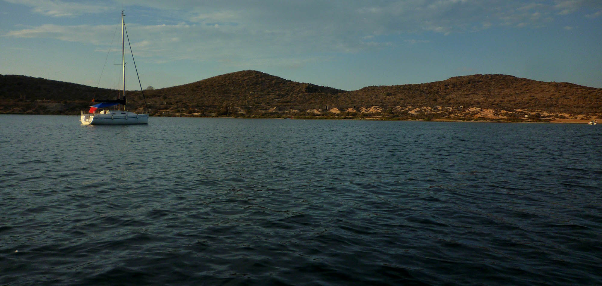 Isla Perdiguera en el Mar Menor, Región de Murcia (España).